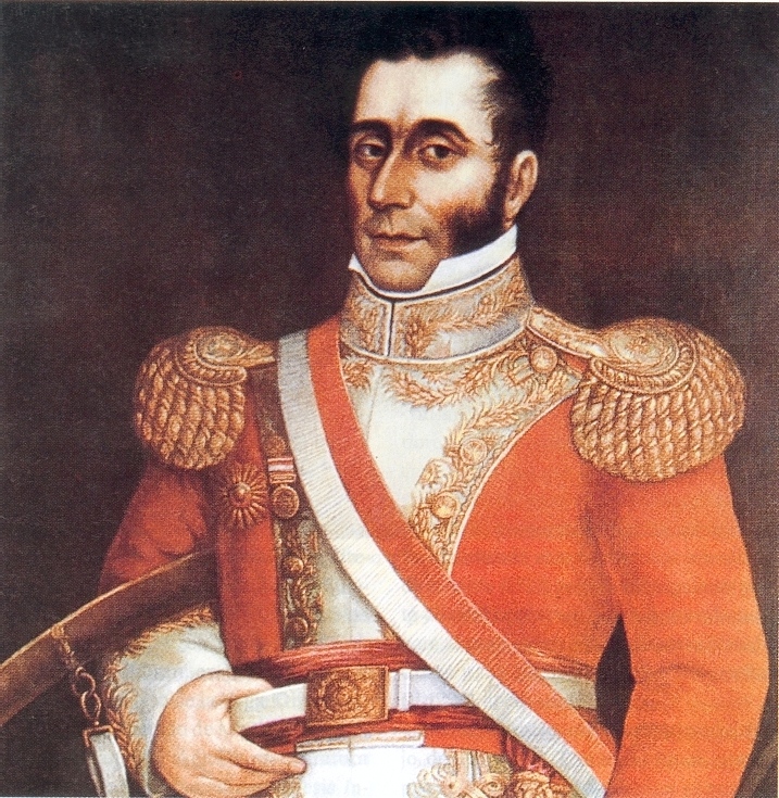 José Bernardo de Tagle y Portocarrero, Marqués de Torre Tagle y Presidente del Perú